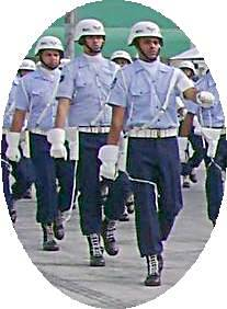 Soldados da Polícia da Aeronáutica - Força Aérea Brasileira - Brasil